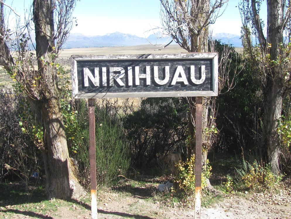 Estación Ñirihuau, Río Negro, Argentina.